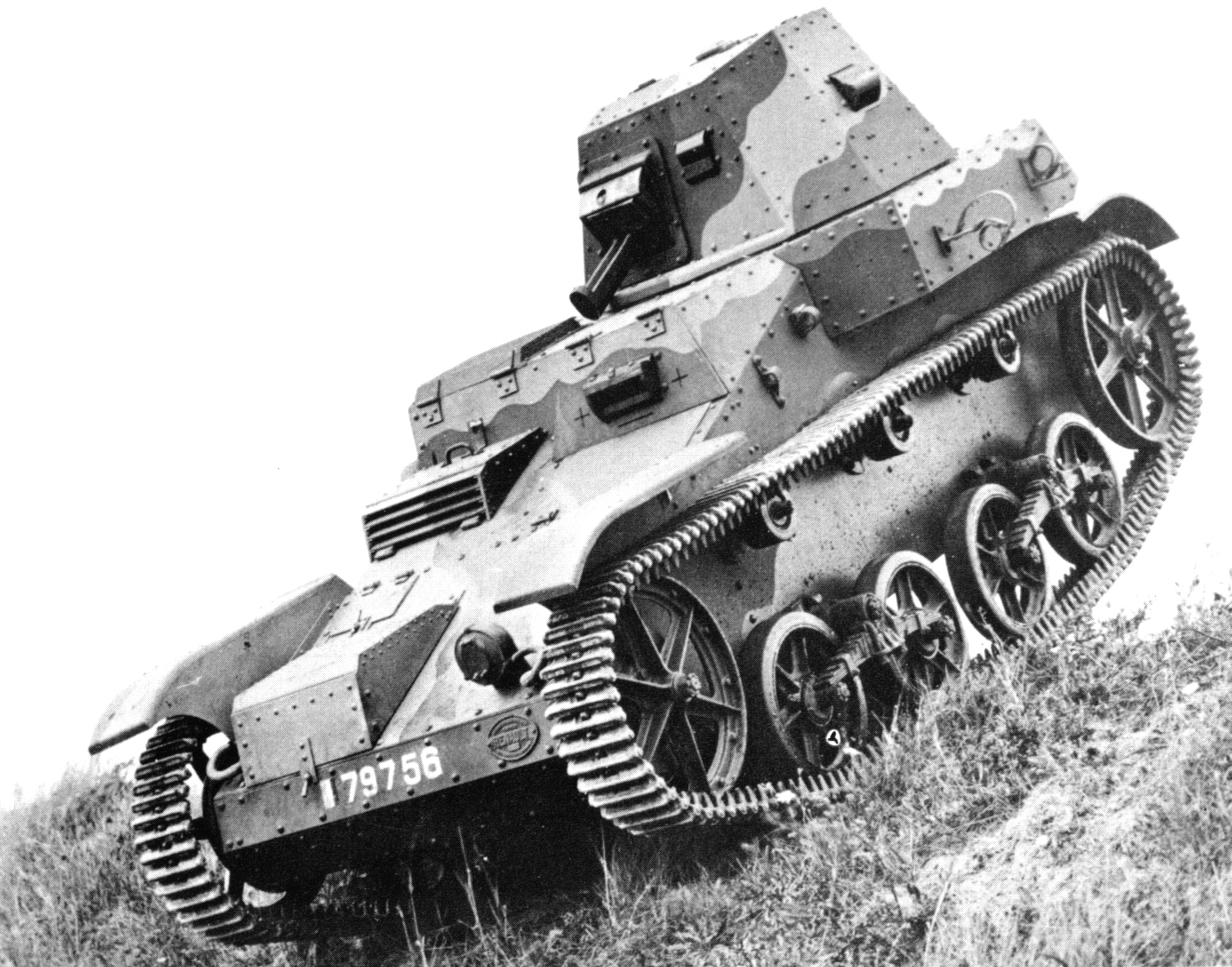 Digitale reproductie foto van prototype 79756 van de AMR 33